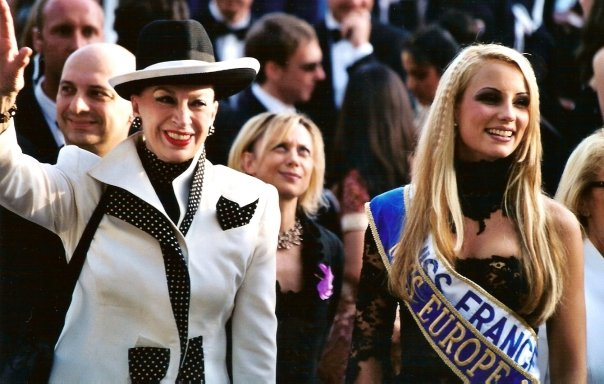 Geneviève de Fontenay et Elodie Gossuin au festival de Cannes